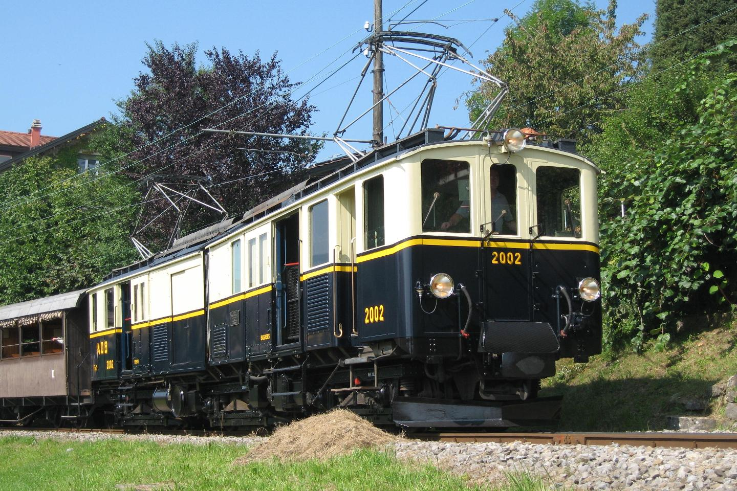 Zwischen Blonay und der Haltestelle Chantemerle bergwärts fahrender Zug der Museumsbahn Blonay–Chamby (BC) auf der Bahnstrecke Blonay–Chamby. An der Spitze der frisch gestrichen und frisch beschriftete historische Gepäck- und Posttriebwagen FZe 6/6 2002 der Montreux-Berner Oberland-Bahn (MOB).